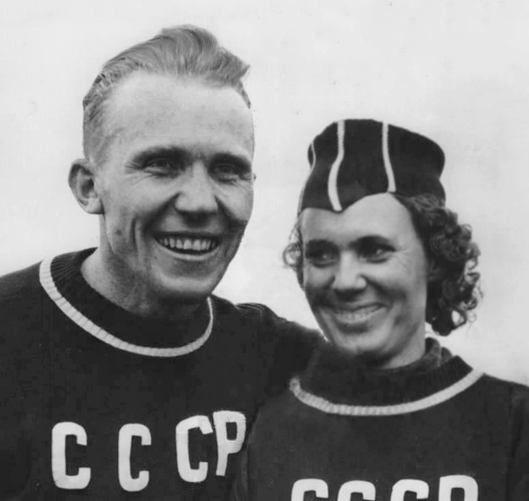 1956 Press Photo Soviet runners Vladimir Kutz & Nina Otkalenko smile & pose